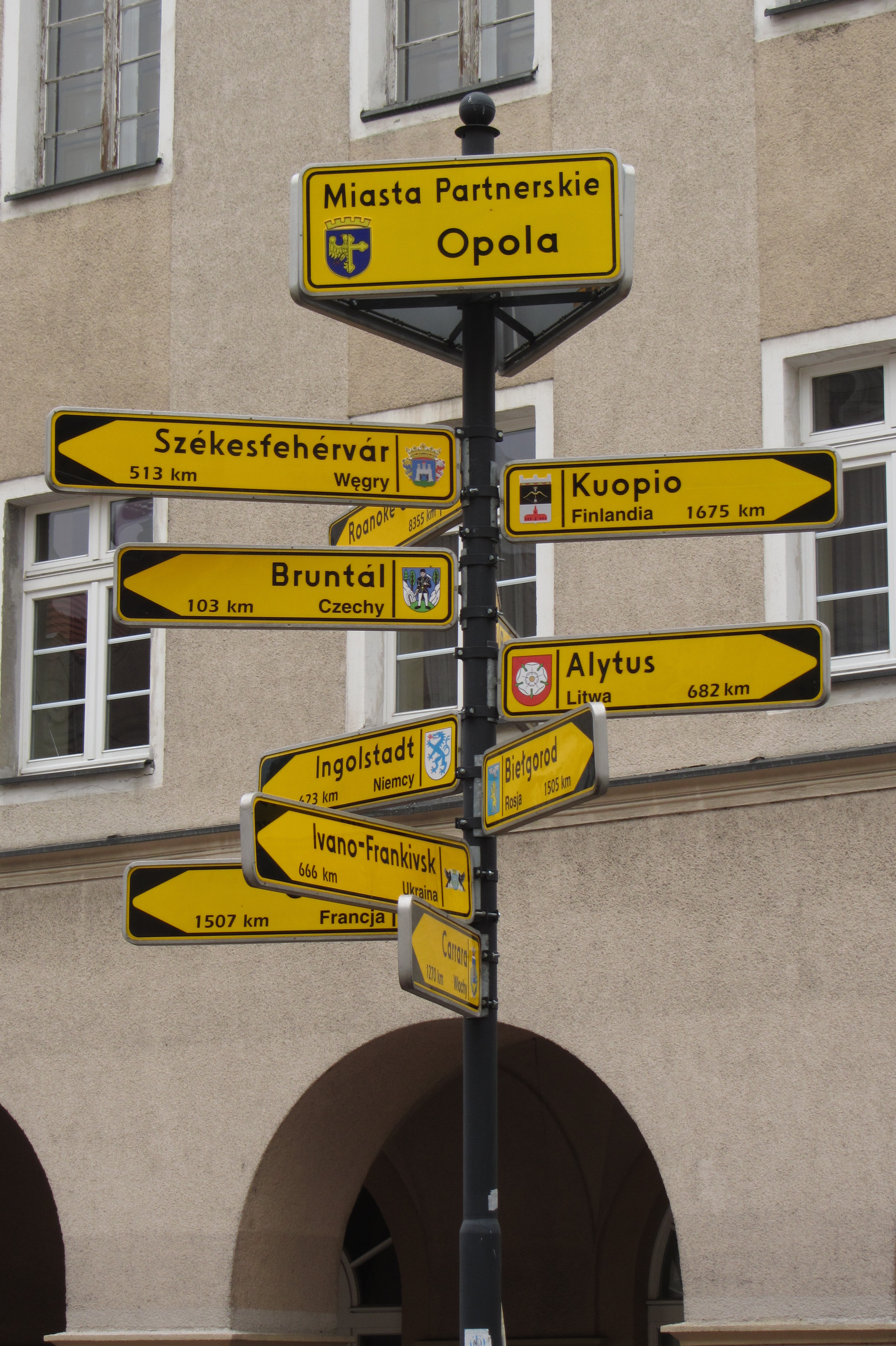 Wegweiser der Partnerstädte in Oppeln